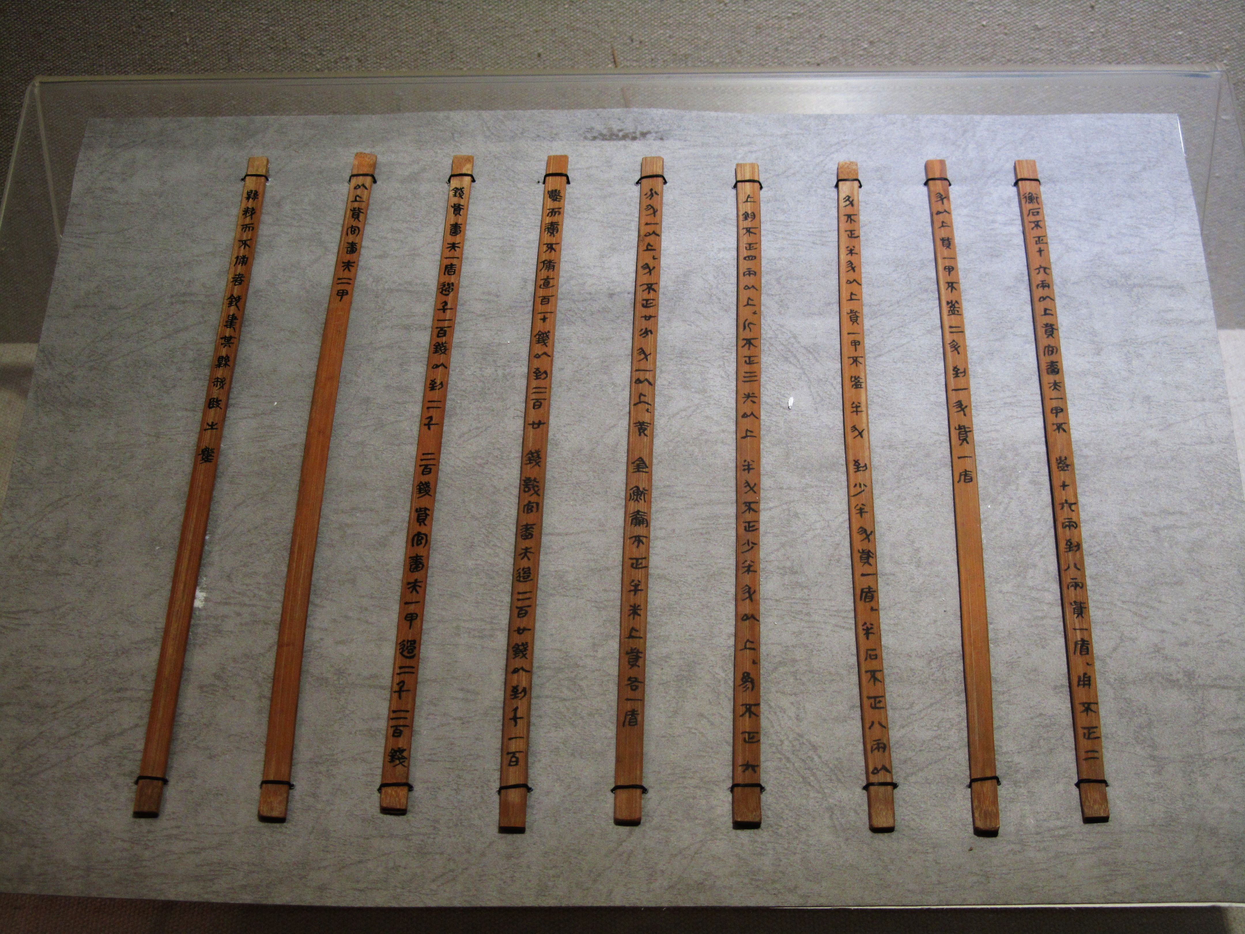 睡虎地秦墓竹简——《效律》，为有关都官和县核验官府的物资财产和审查会计账目的专门财经法纪处罚律法，1975年出土于湖北省云梦县睡虎地秦墓，现藏南通中国审计博物馆。